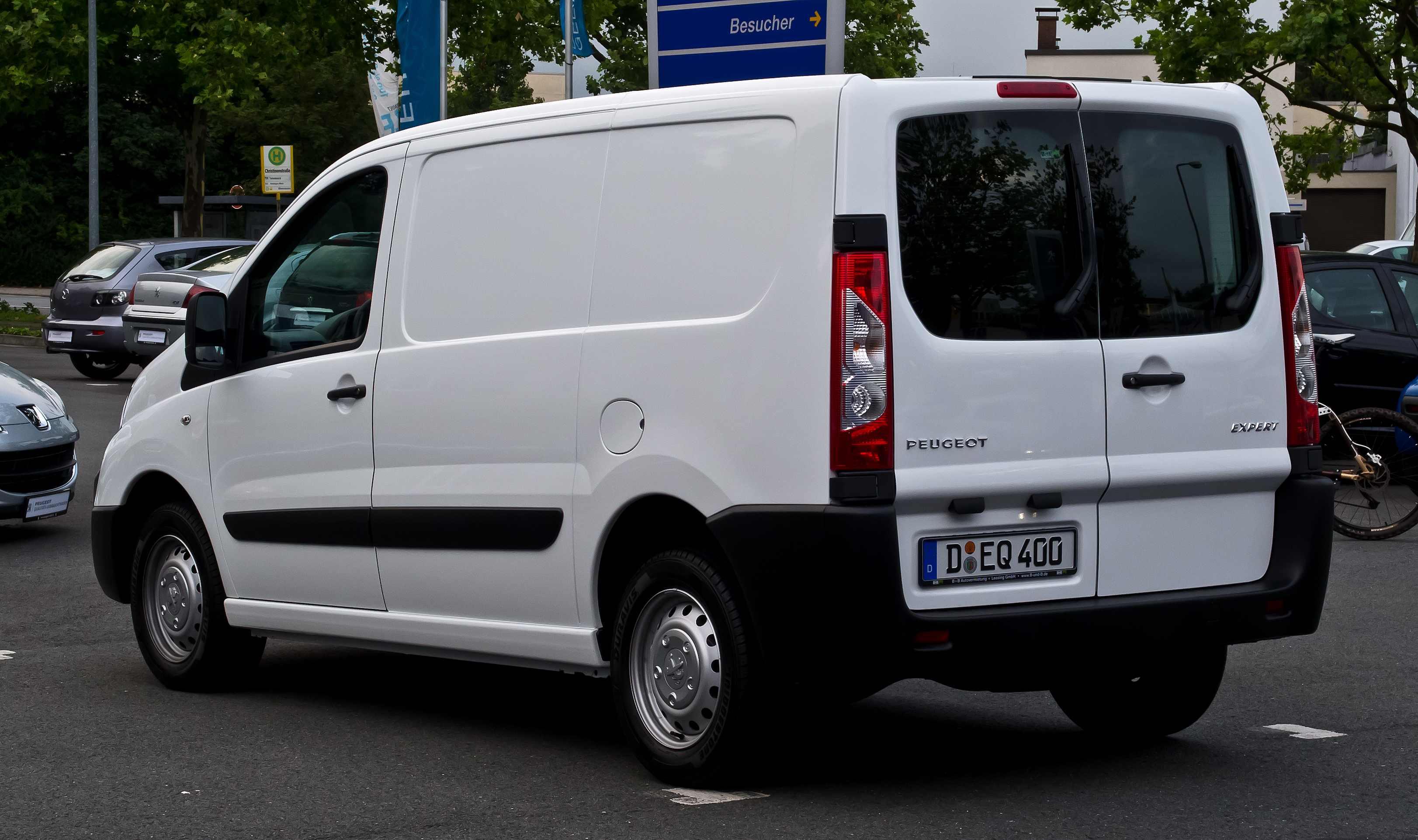 Peugeot Expert (II, Facelift)